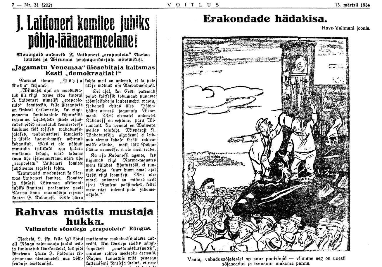 Valtman-HAVE karikatuur ajalehe VÕITLUS viimases numbris, mis ilmus päev enne üleriikliku erakorralise seisukorra välja kuulutamist riigivanem Pätsi poolt.